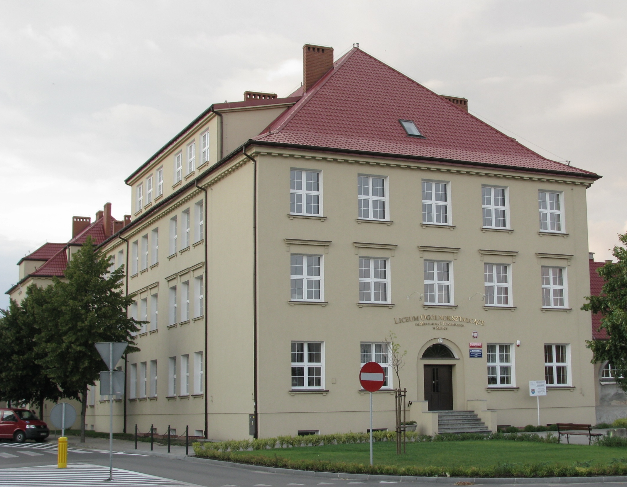 Liceum Ogólnokształcące im.J.Piłsudskiego w Słupcy, Plac Szkolny